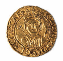 Ducado de oro de Zaragoza del reinado de Juan II de Aragón (1458-1479). Oro, 21,7 mm diámetro. MAN 105297